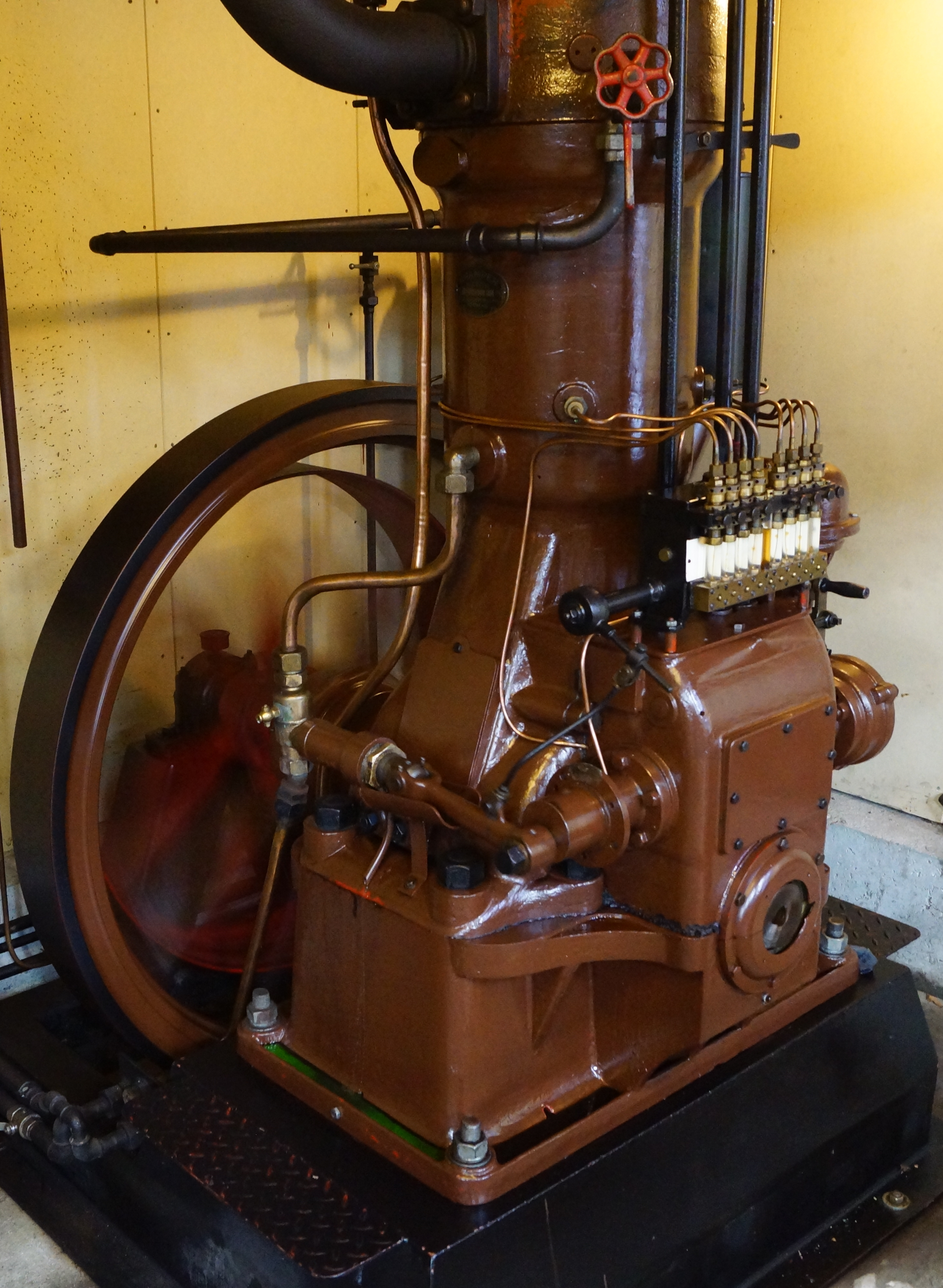 Rudolf K Motor